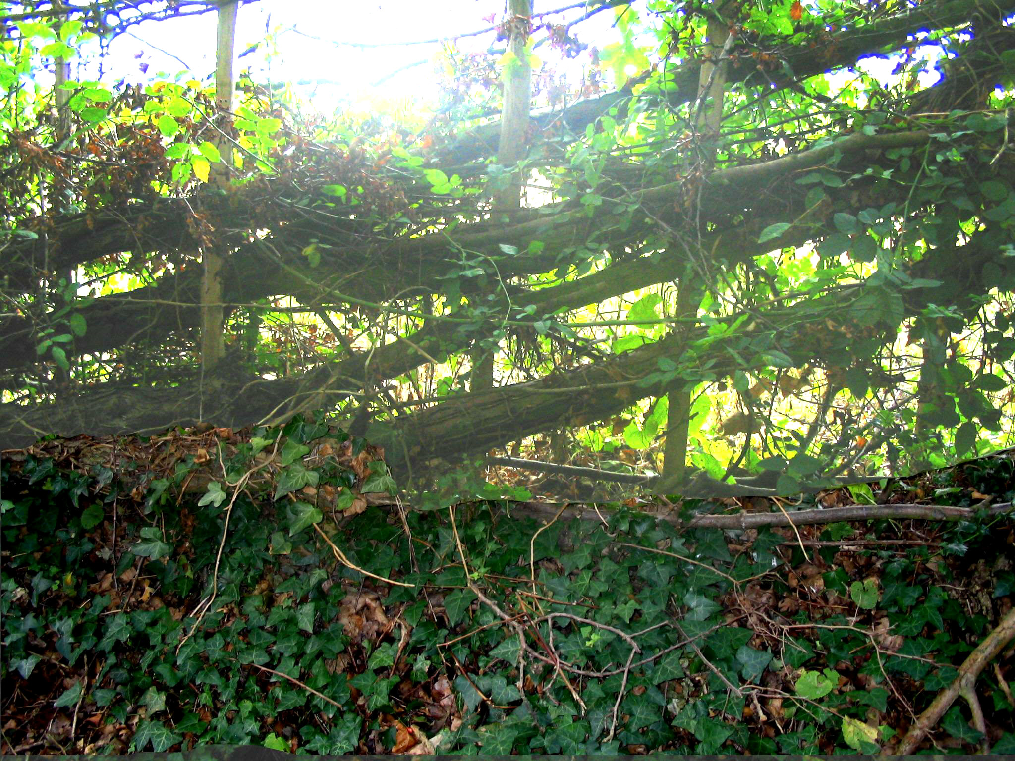 détail de haie plessée Auteur: P Charpiat - 2006